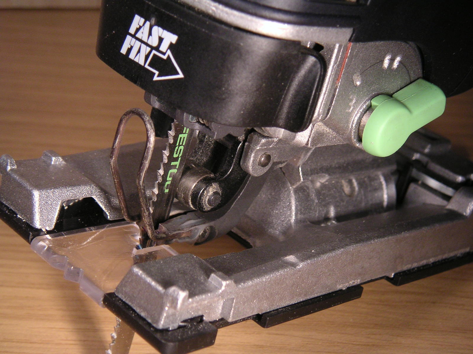 Stichsäge Festool PS 300 EQ Detailansicht selbst fotografiert Oxensepp 2008-01-05